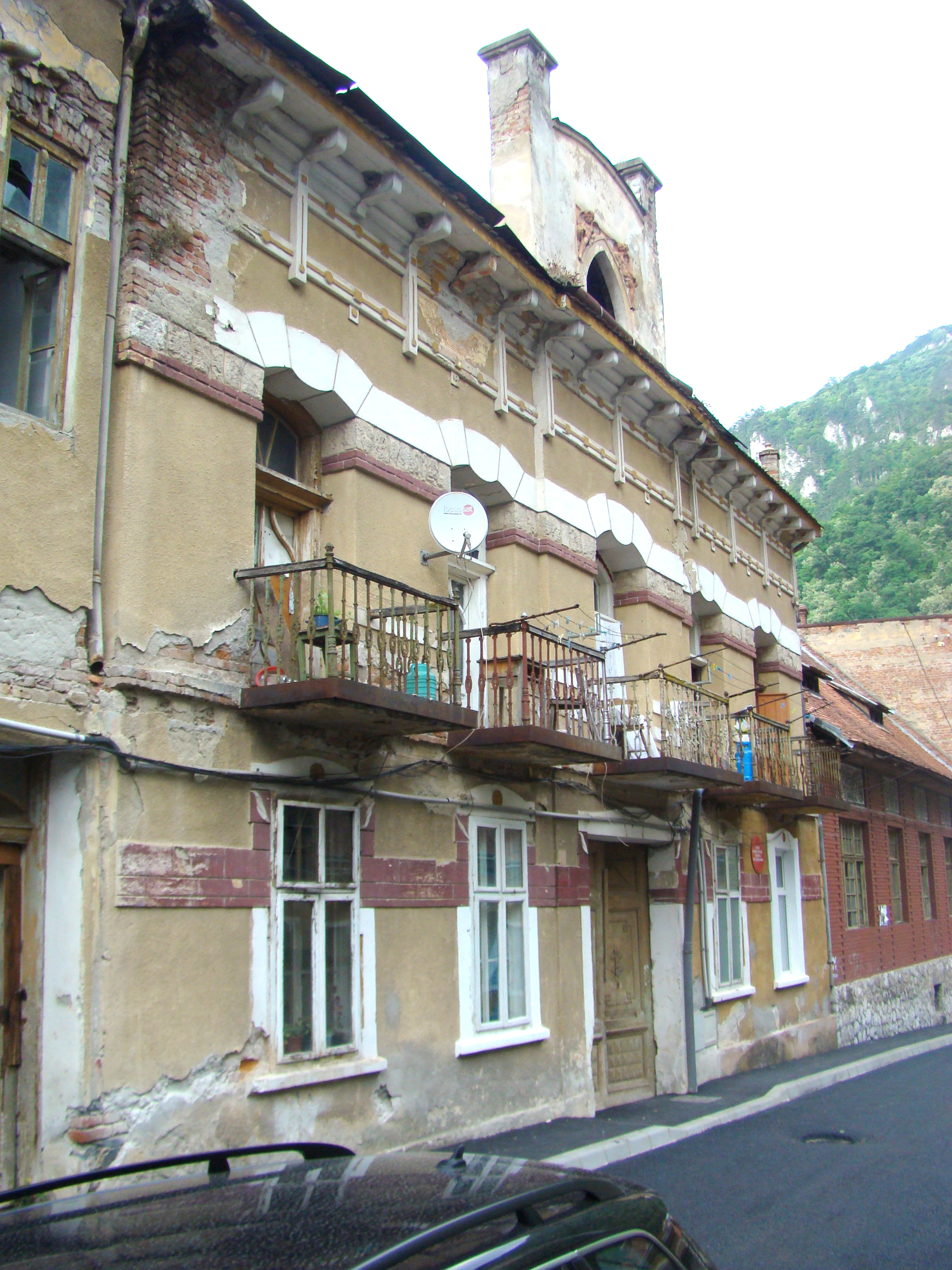 Vila „Dora”, azi locuință, oraș Băile Herculane, Str. Stoica de Hațeg Nicolae 3